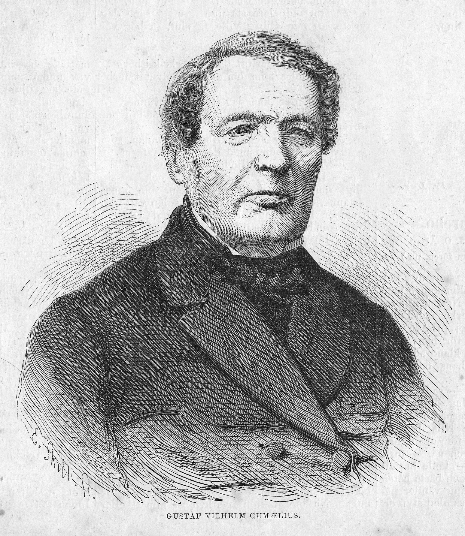 Gustaf Vilhelm Gumaelius from "Hemvännen" 1877.